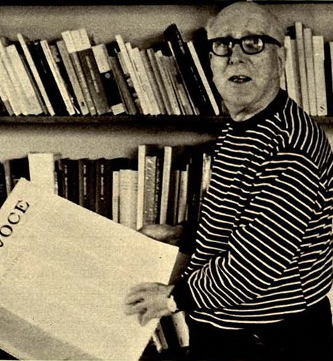 Italian writer Giuseppe Prezzolini